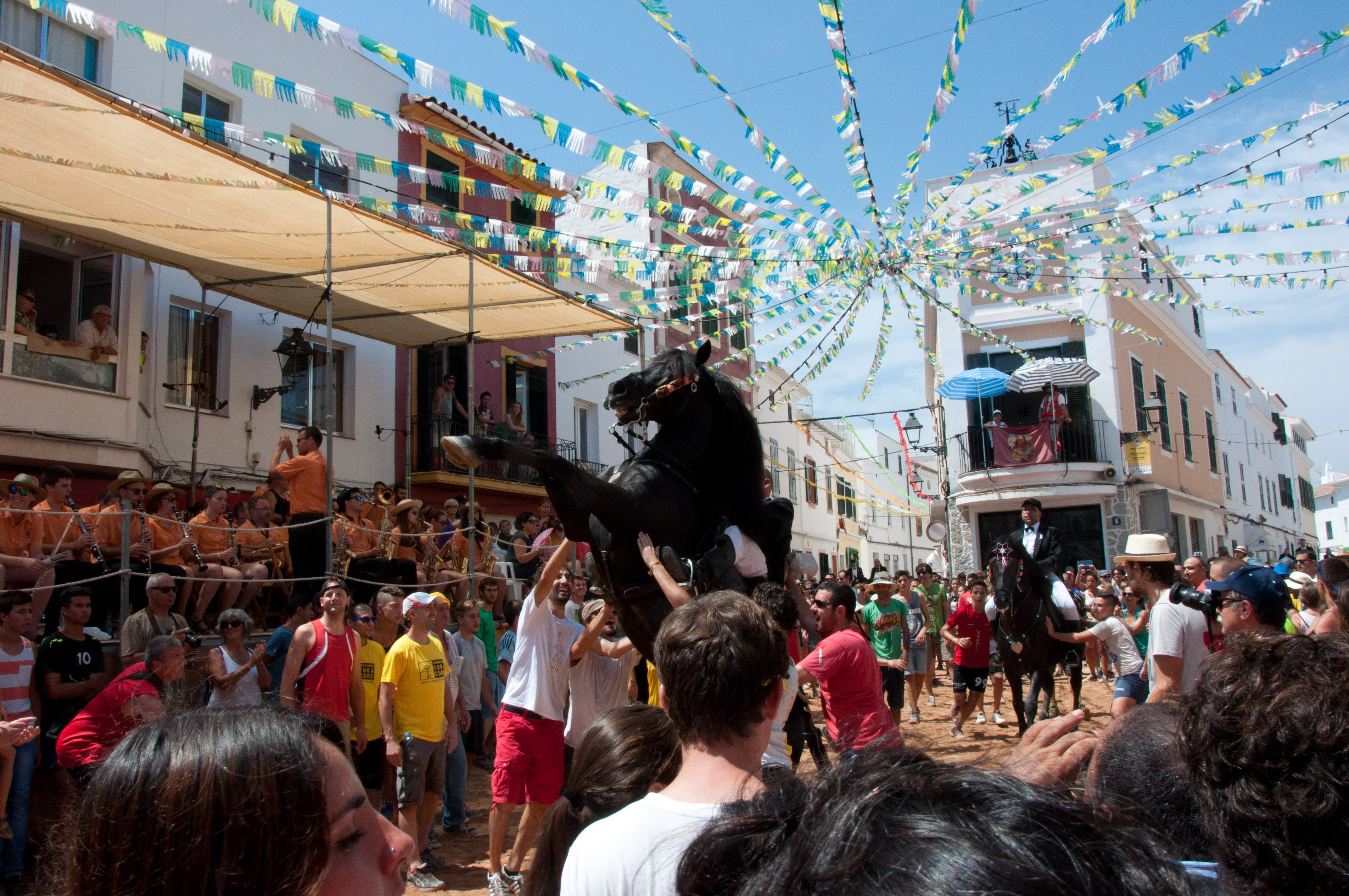 Jaleo en Mercadal This is a photography of a Folklore festival in Spain (Wikidata id Q23662637).